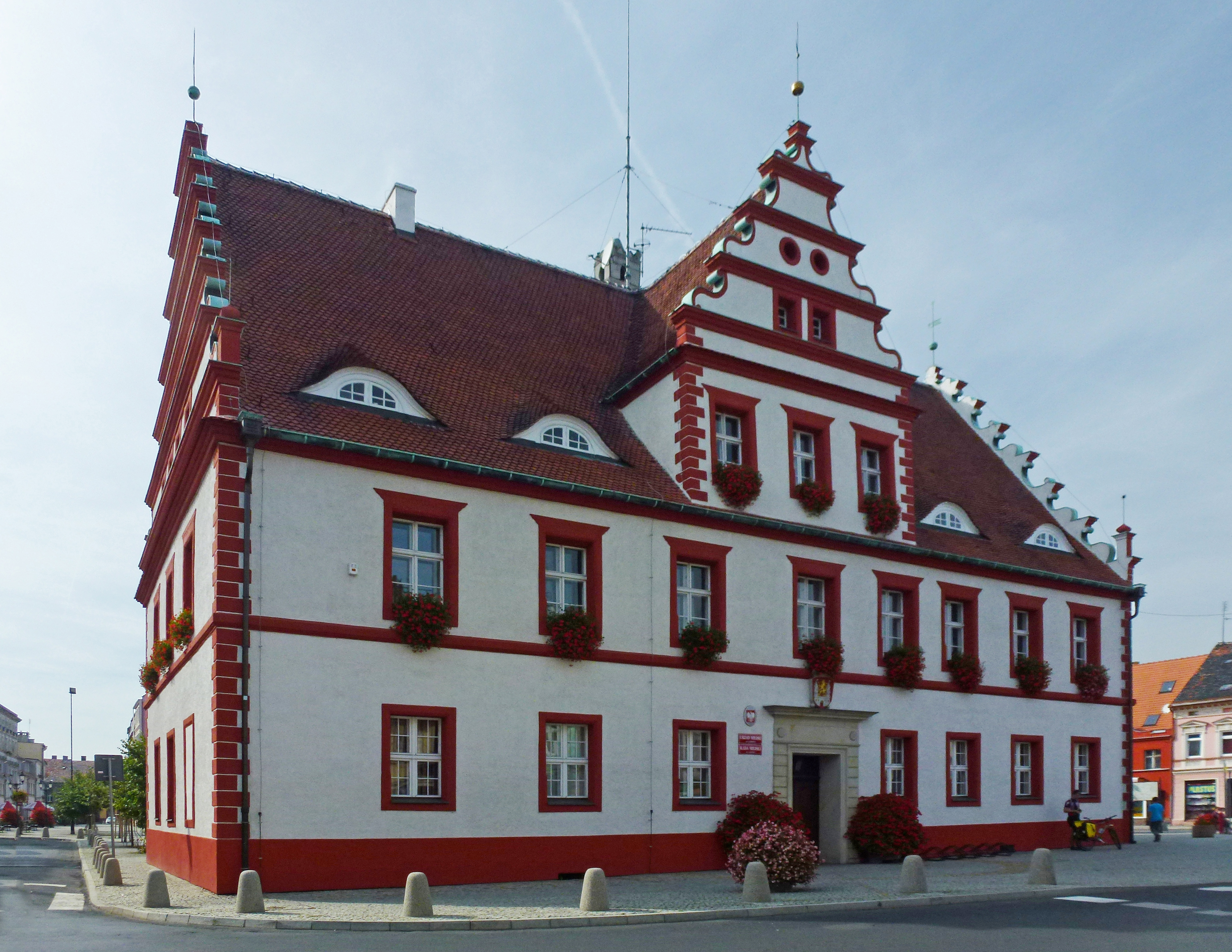 Lubsko - ratusz, 1580 (zabytek nr 314 z 2.05.1961)